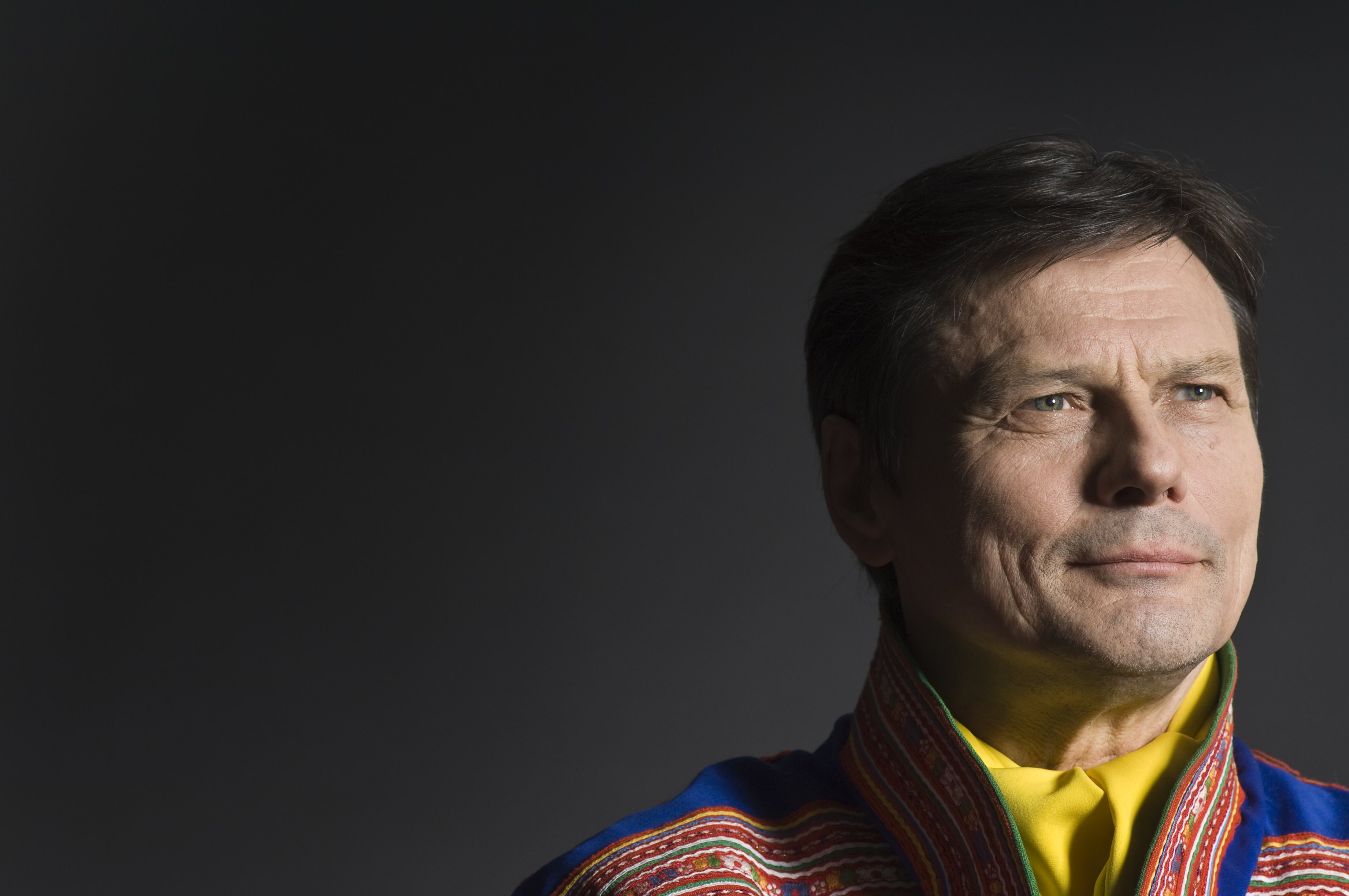 Fotograf: Bjørn Joachimsen, Foto Nord Ole Henrik Magga (NSR) var Sametingets første president. Han var også den første lederen av FN Permanente Forum for urfolkssaker, og er tidligere leder i Norske Samers Riksforbund. Fortsatt stiller han som listekandidat for NSR ved høstens sametingsvalg.